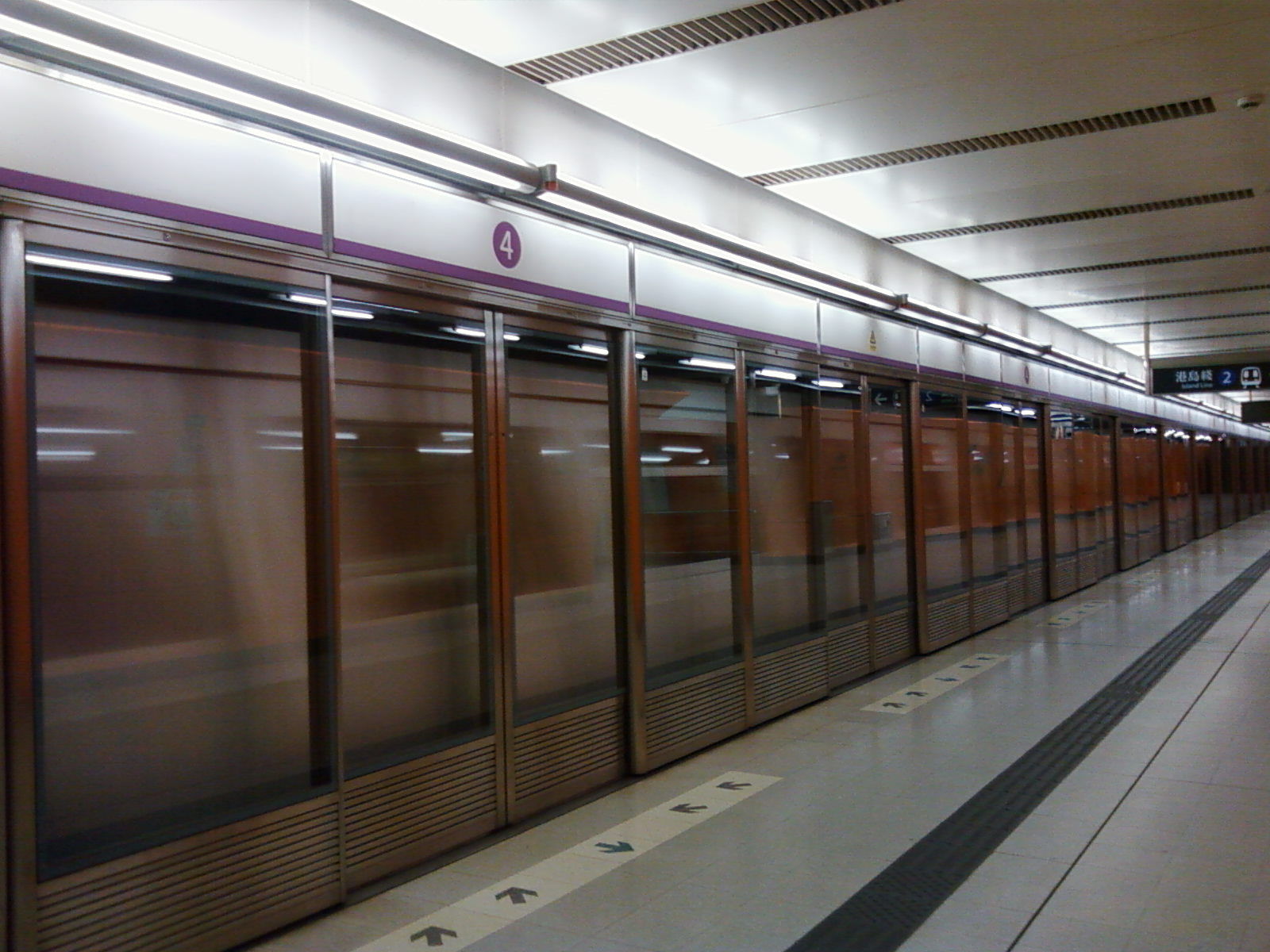 港鐵北角站4號月台